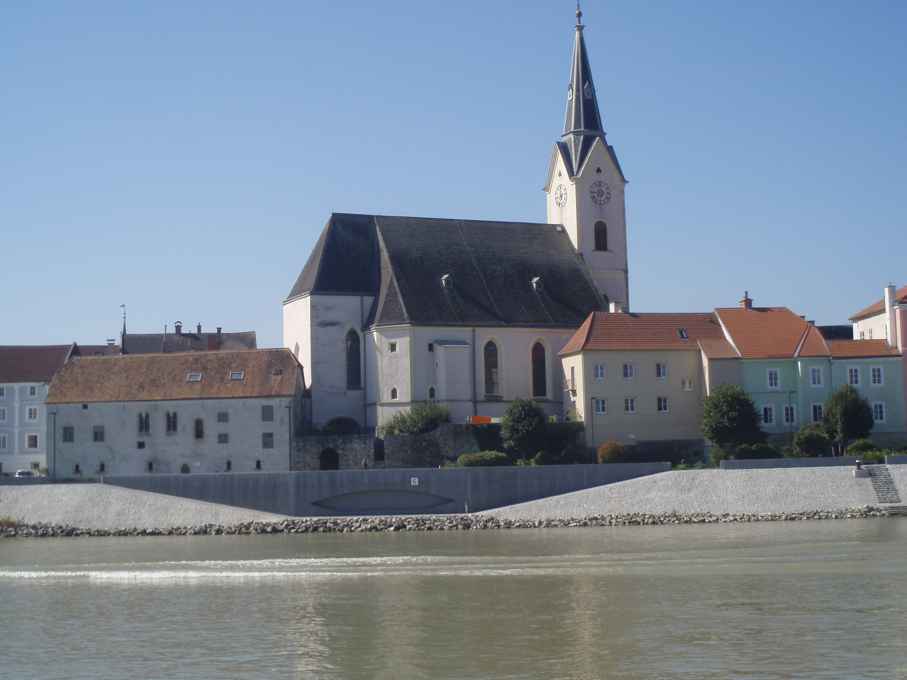 Ybbs an der Donau